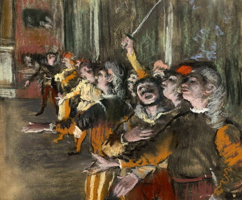 Les Choristes